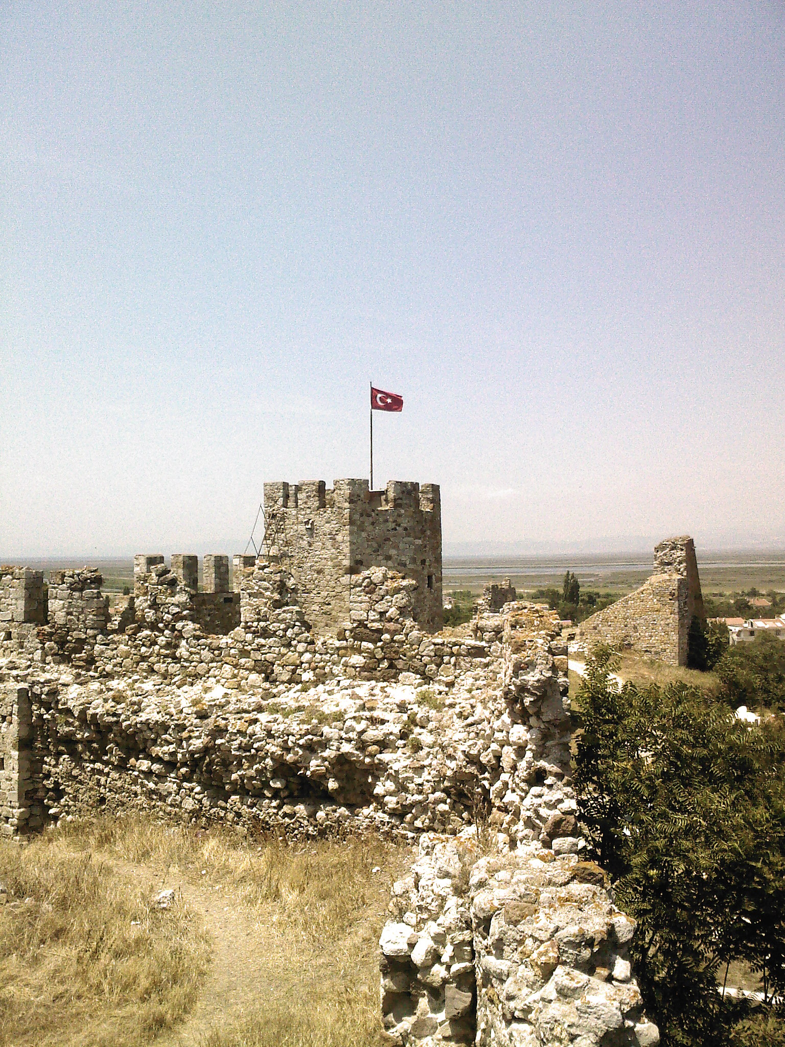 edirne enez kalesi